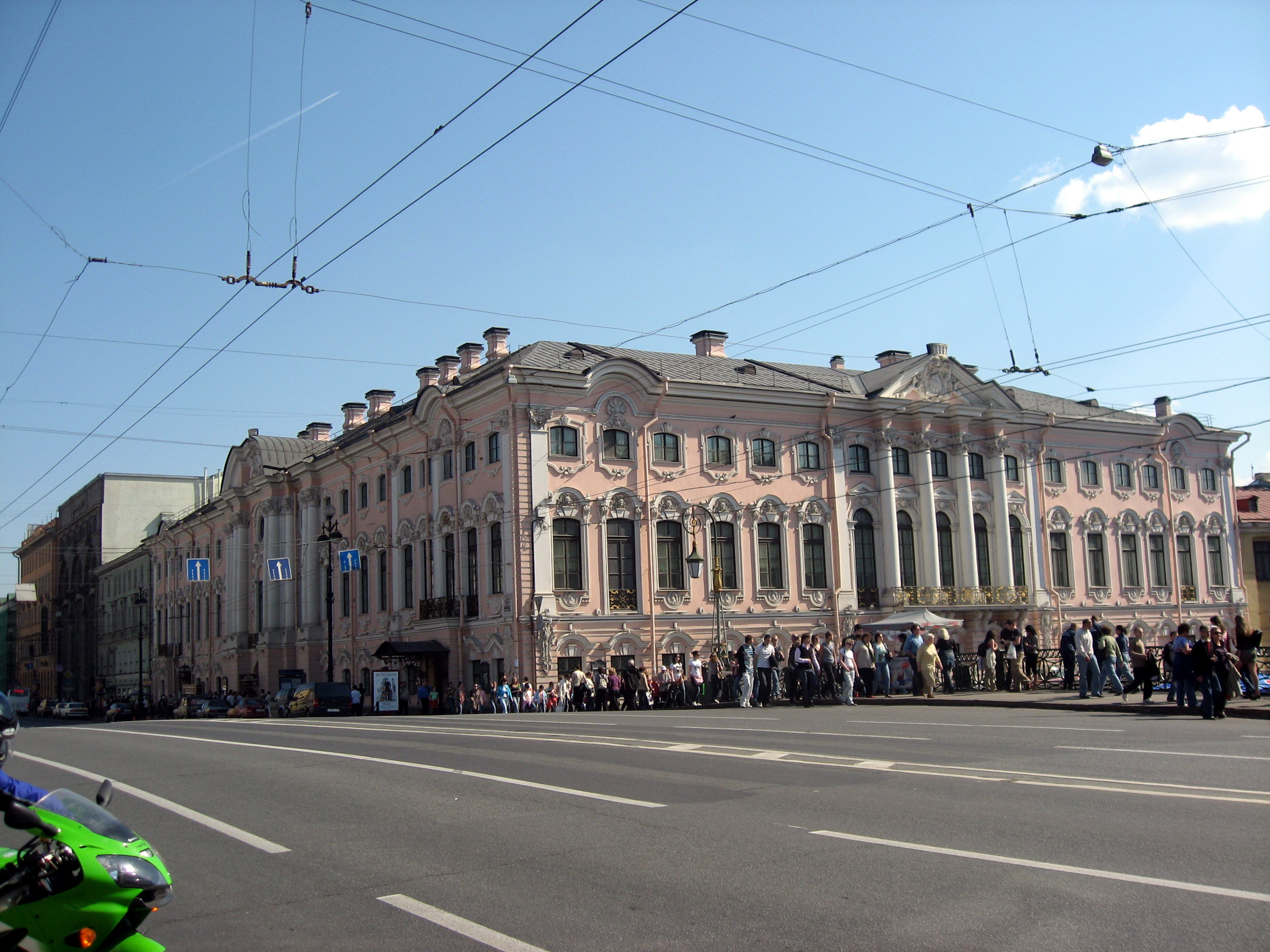 Sankt-Petěrburg